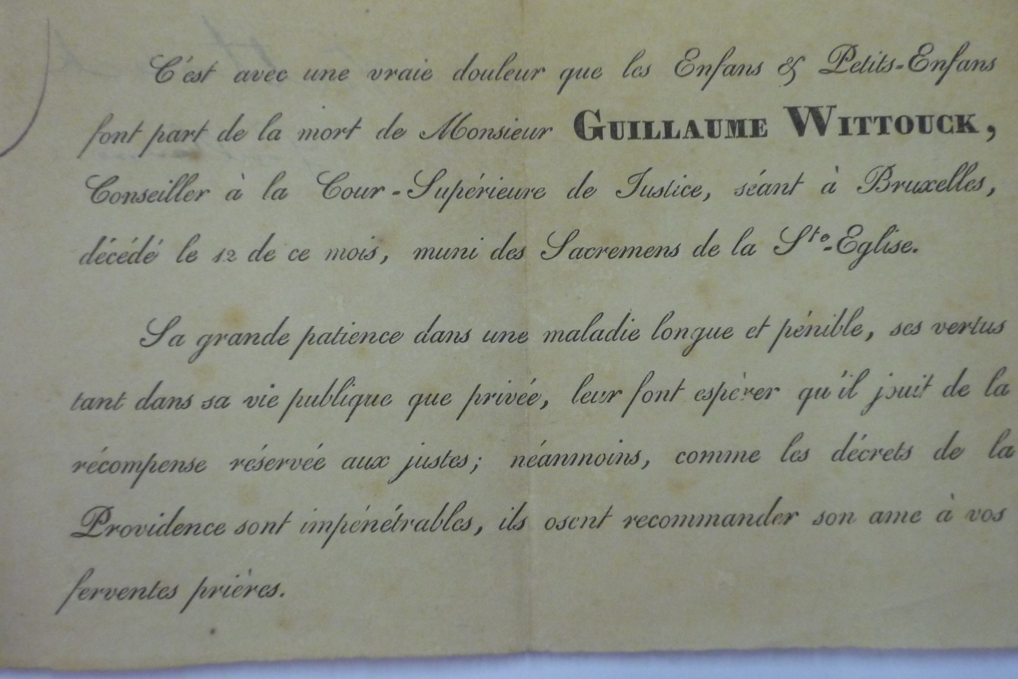 Faire-part de décès de Guillaume Wittouck, conseiller à la Cour Suprême de Brabant, il termina sa carrière comme conseiller à la Cour Supérieure de Justice de Bruxelles, né à Drogenbos le 30 octobre 1749, décédé à Bruxelles le 12 juin 1829, les obsèques eurent lieu à Leeuw-Saint-Pierre où il habitait au château de Petit-Bigard, et un service fut célèbré en l'église Notre-Dame de Bon Secours à Bruxelles, située Marché aux Charbon en face de sa demeure. Il avait épousé à Bruxelles, églis St.-Nicolas le 29 juin 1778 (témoins : Consultissimus Dominus Thomas Joseph Limelette et Jacques (Jacobus) Covens), Anne Marie COOLS, née à Gooik le 25 janvier 1754 et décédée à Bruxelles le 11 avril 1824, fille de Jean-Baptiste COOLS (Gooik, 14-01-1718 - Gooik, 20 juin 1782) et d'Adrienne Christine Galmaert (Gooik 26 oct. 1724 - Gooik 3 mai 1764).